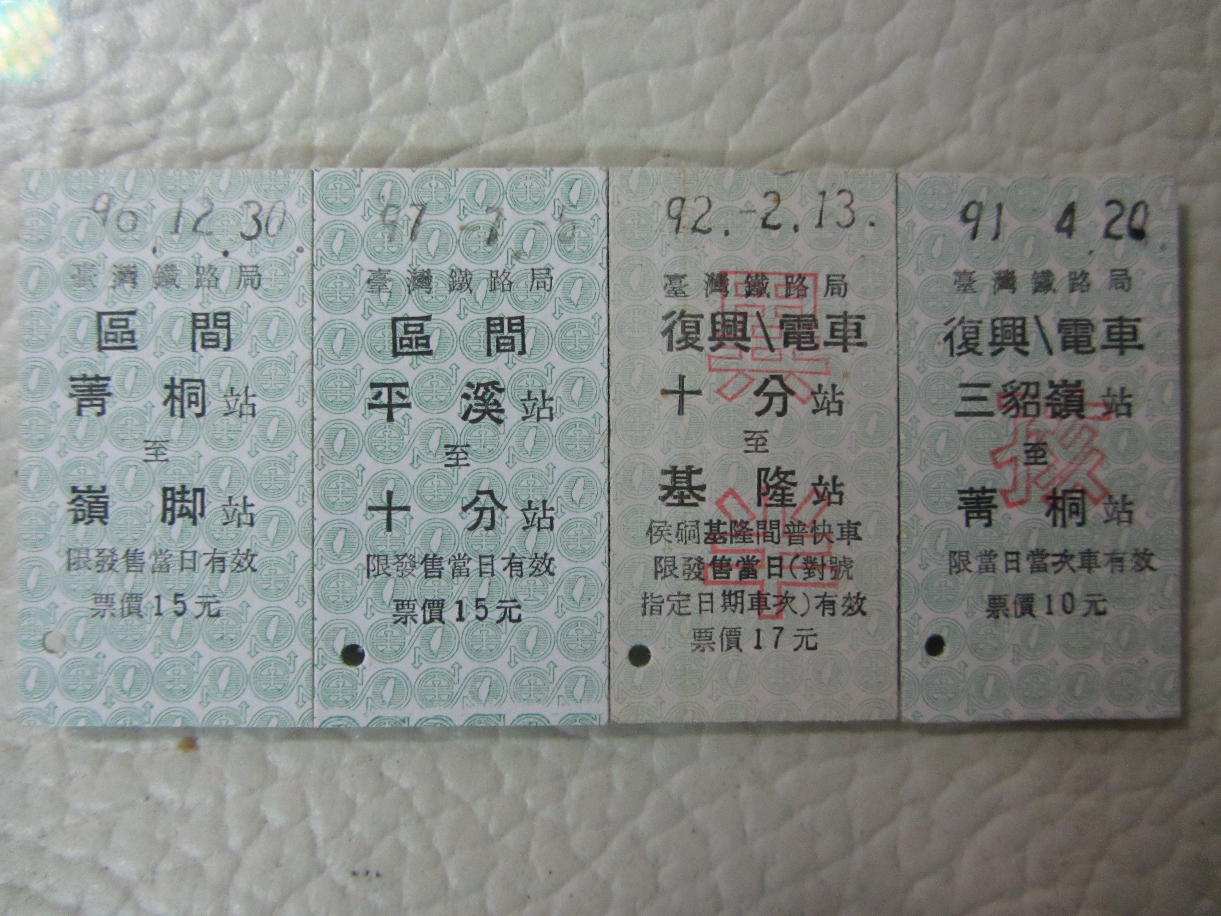 台鐵平溪線名片式車票